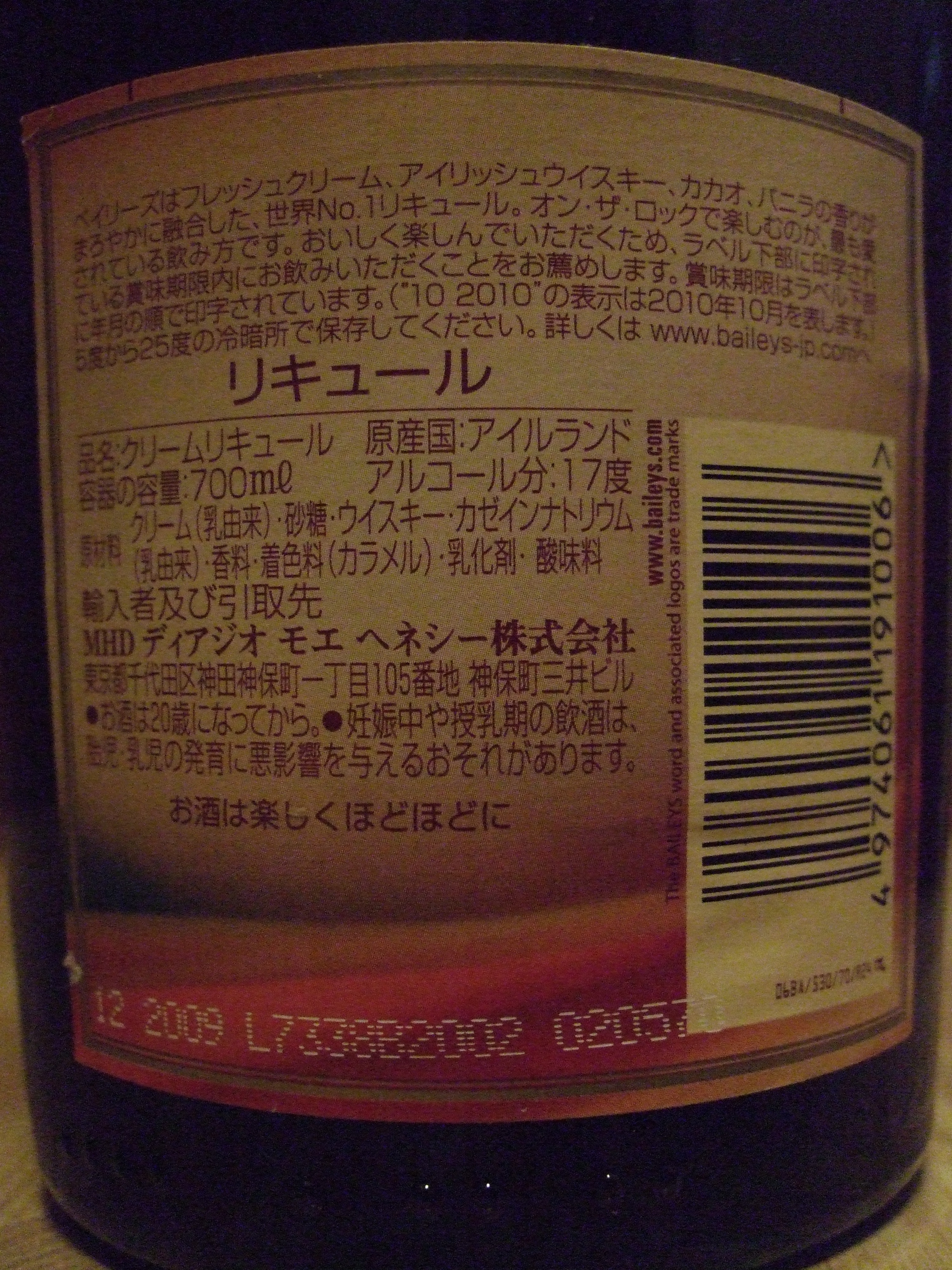 ベイリーズ・アイリッシュ・クリームのボトル背面に張られたラベルの写真。賞味期限がわかるよう撮影。